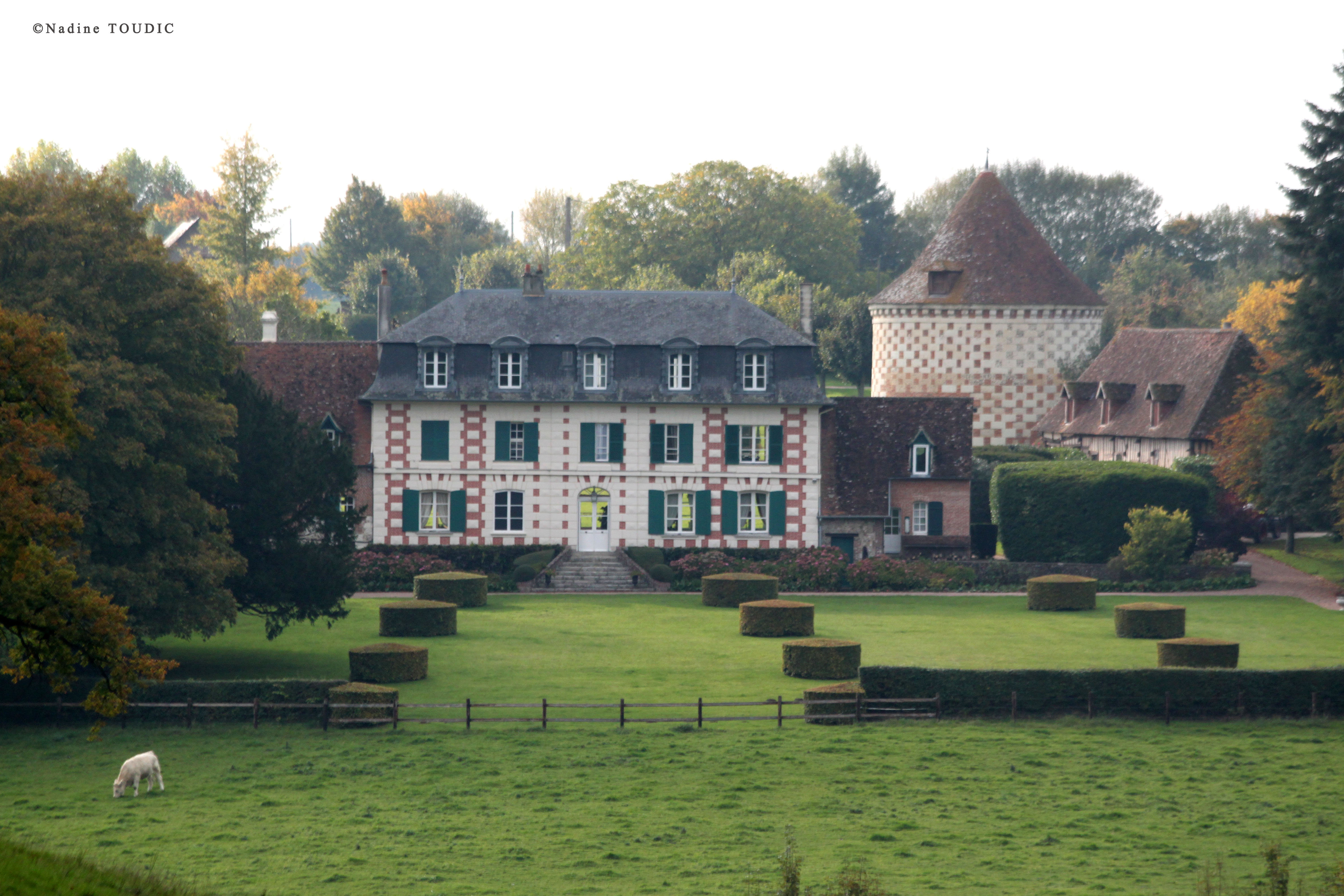 Château du Benerey